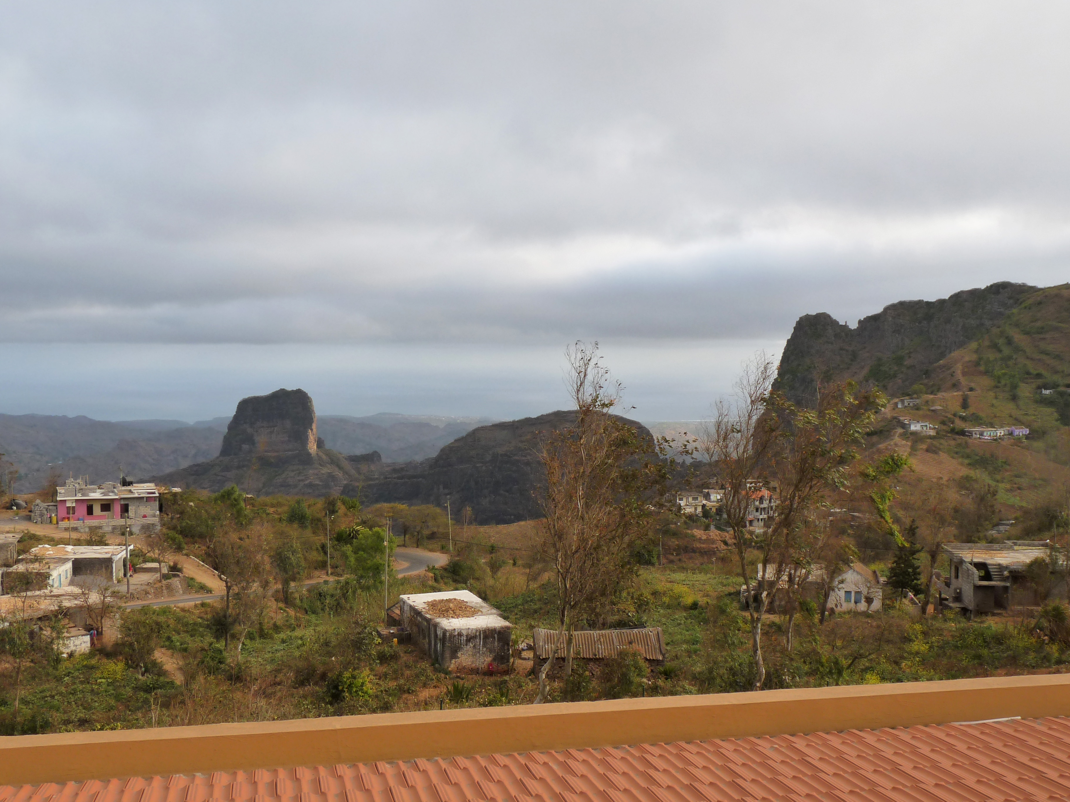 Quinta da Montanha, hôtel à Rui Vaz (île de Santiago, Cap-Vert) . Panorama